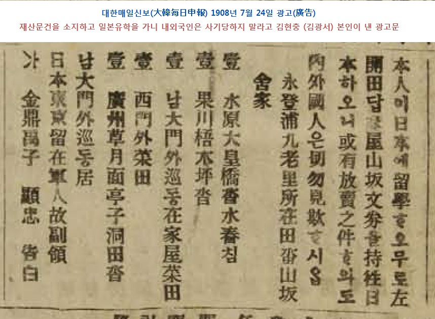 김현충(김광서) 장군이 재산문건을 소지하고 일본 유학을 가니 내외국인은 사기 당하지 말라고 낸 1908-07-24 대한매일신보 광고